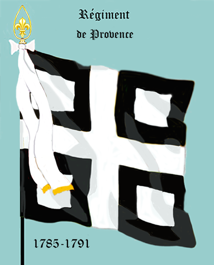 Ordonnanzfahne eines königlich französischen Infanterie-Regiments. - Entnommen und überarbeitet aus: „LES UNIFORMES ET LES DRAPEAUX DE L'ARMÉE DU ROI“ Marseille 1899. (Drapeau d'Ordonnance d' un régiment française d'infanterie royale.)